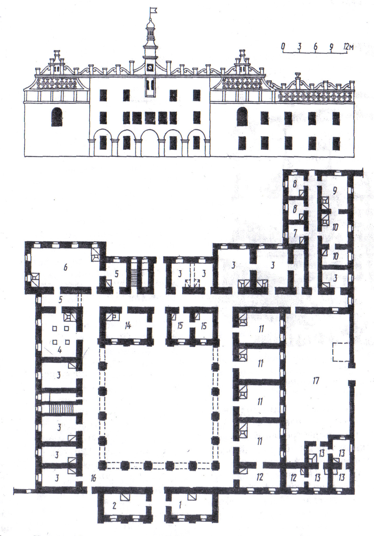 Фасад і план Нясвіжскага калегіума